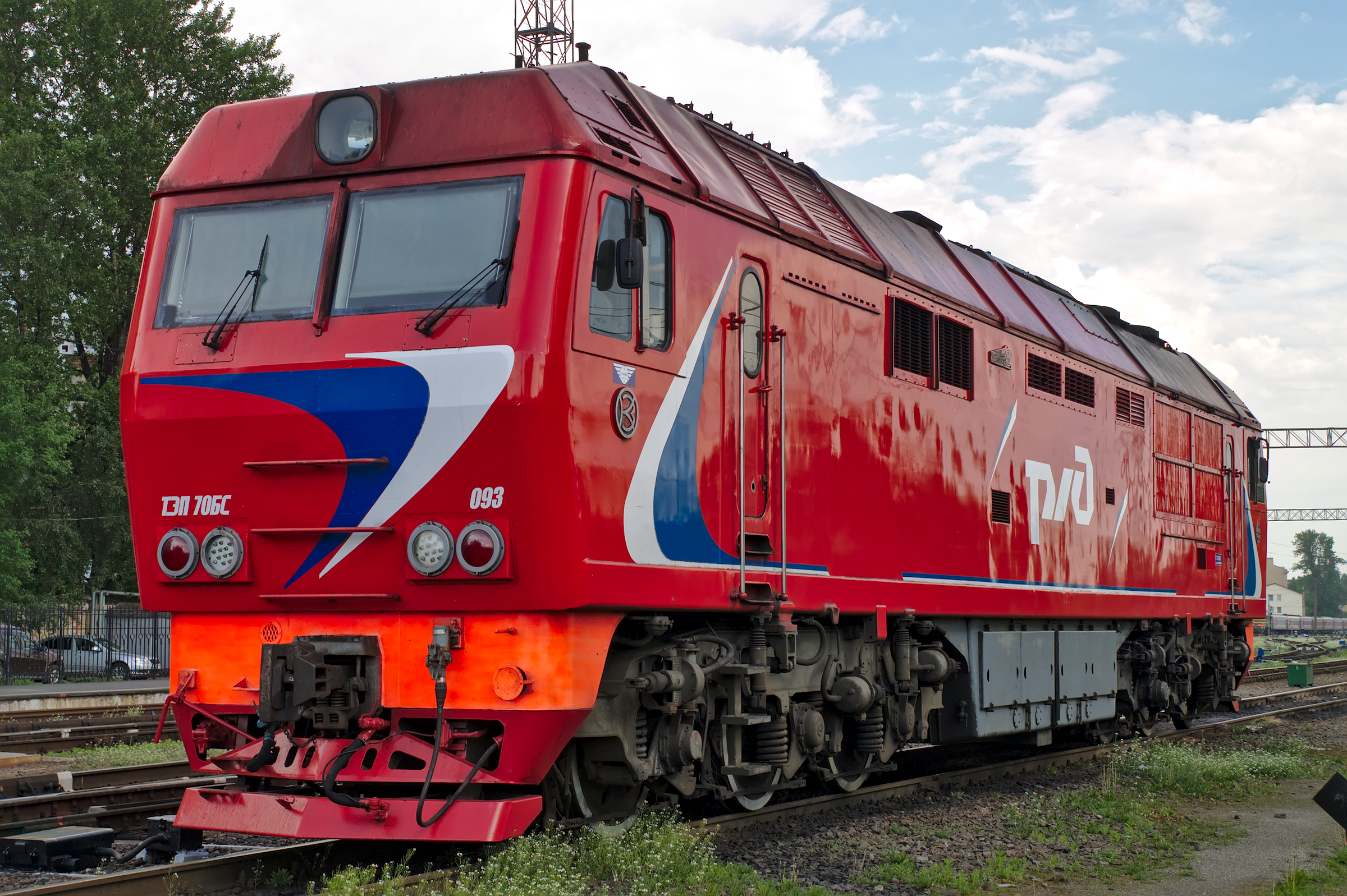 ТЭП70БС-093, Санкт-Петербург-Витебский. см. фото 638884 в альбоме автора